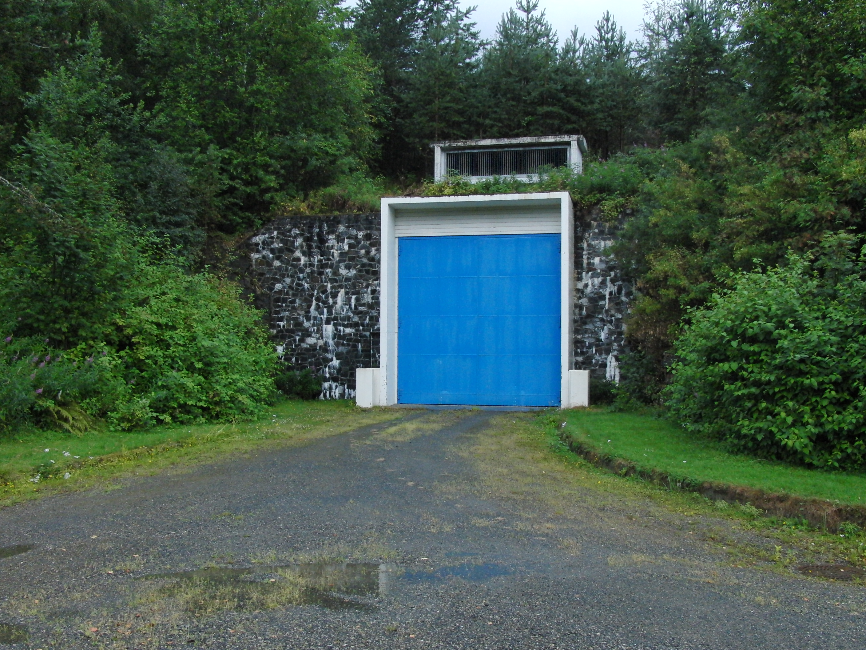 Hunderfossen kraftverk portal.JPG